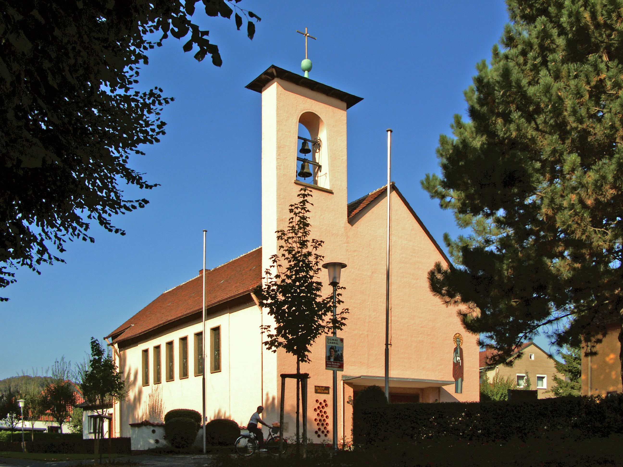 Katholische Kirche St. Joseph in Othfresen, Ortsteil von Liebenburg, Landkreis Goslar